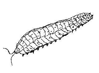 Desenho que mostra reconstituição de Arthropleura.